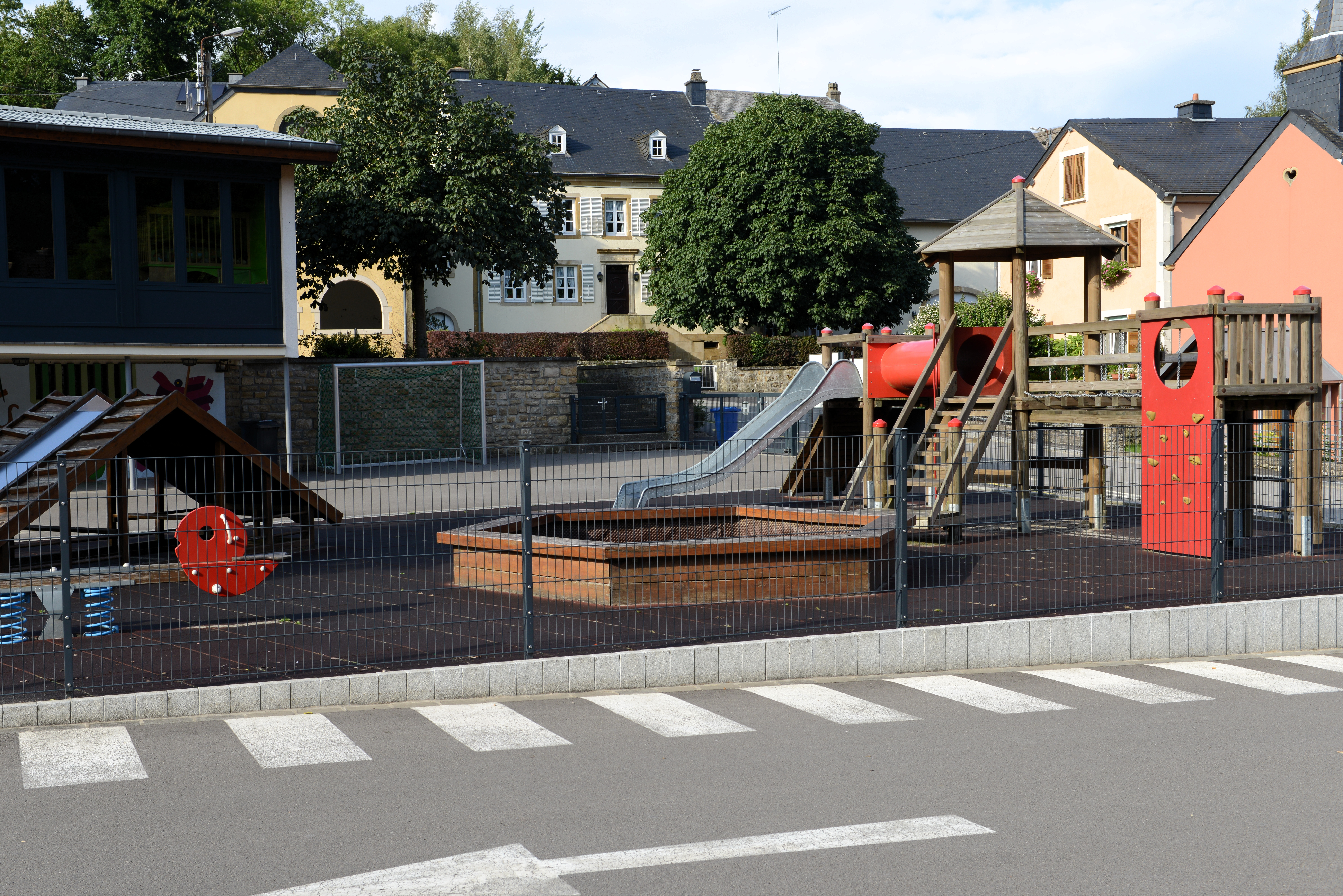 D'Spillplaz vun der Schoul bei der Kierch zu Reiland.